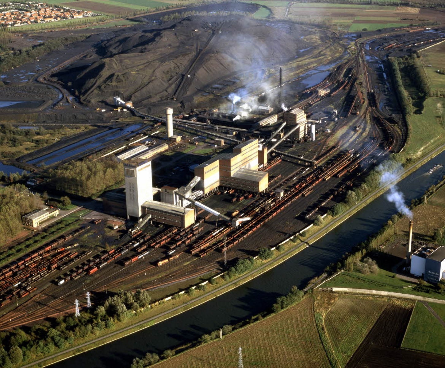 La fosse n° 10 du Groupe d'Oignies était un charbonnage constitué d'un seul puits situé à Dourges, Pas-de-Calais, Nord-Pas-de-Calais, France.